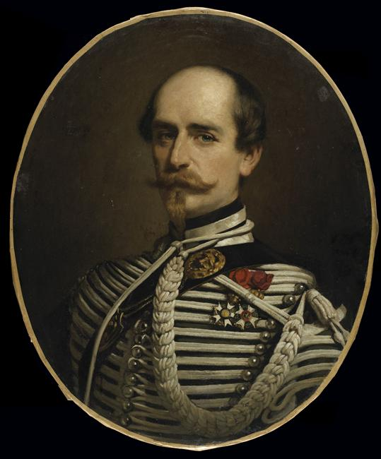 Edgar Ney, prince de la Moskowa (1812-1882), premier veneur